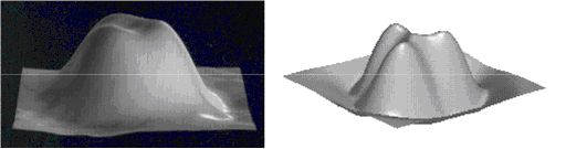 left experimental ; right caculated